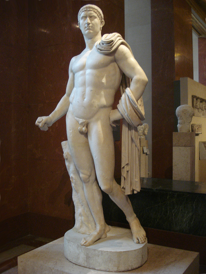 Estátua do imperador Oto. Autor desconhecido, mármore, 69 d.C. (há erro no nome do arquivo). Antiga coleção Braschi. Inventário Louvre MR 317